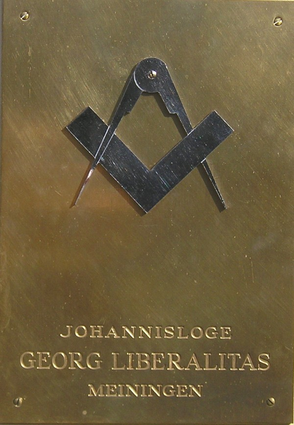 Am Hotel “Sächsischer Hof” in Meiningen, dem Sitz der Freimaurerloge Georg Liberalitas, angebrachte Tafel der Loge.